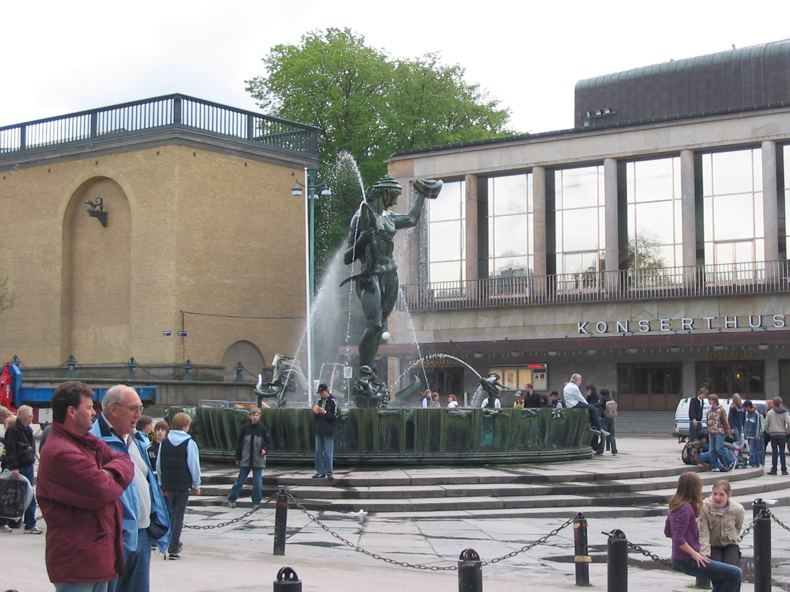 zelfgemaakt met een digitale camera.